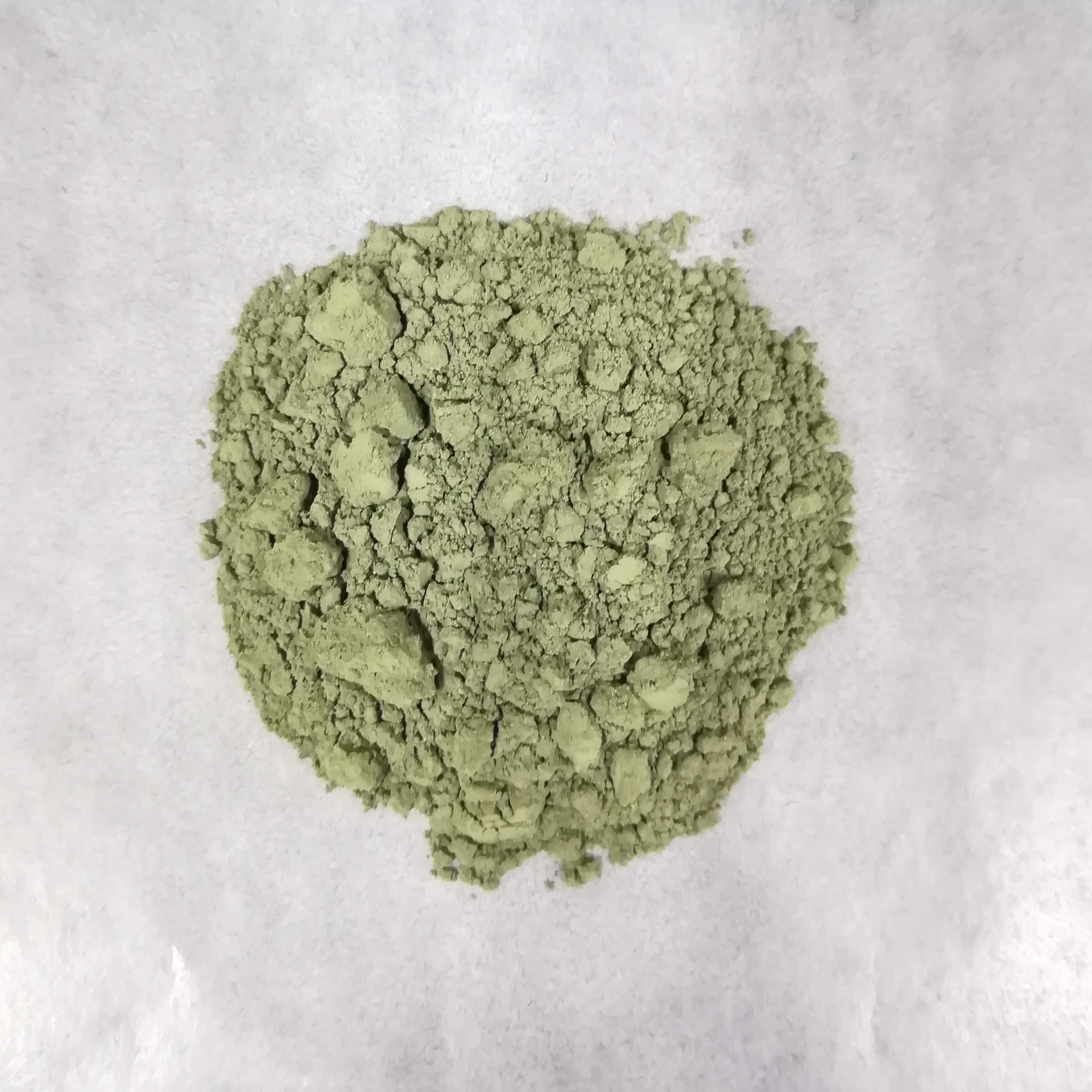 氧化镍(II)，AR，99.0%